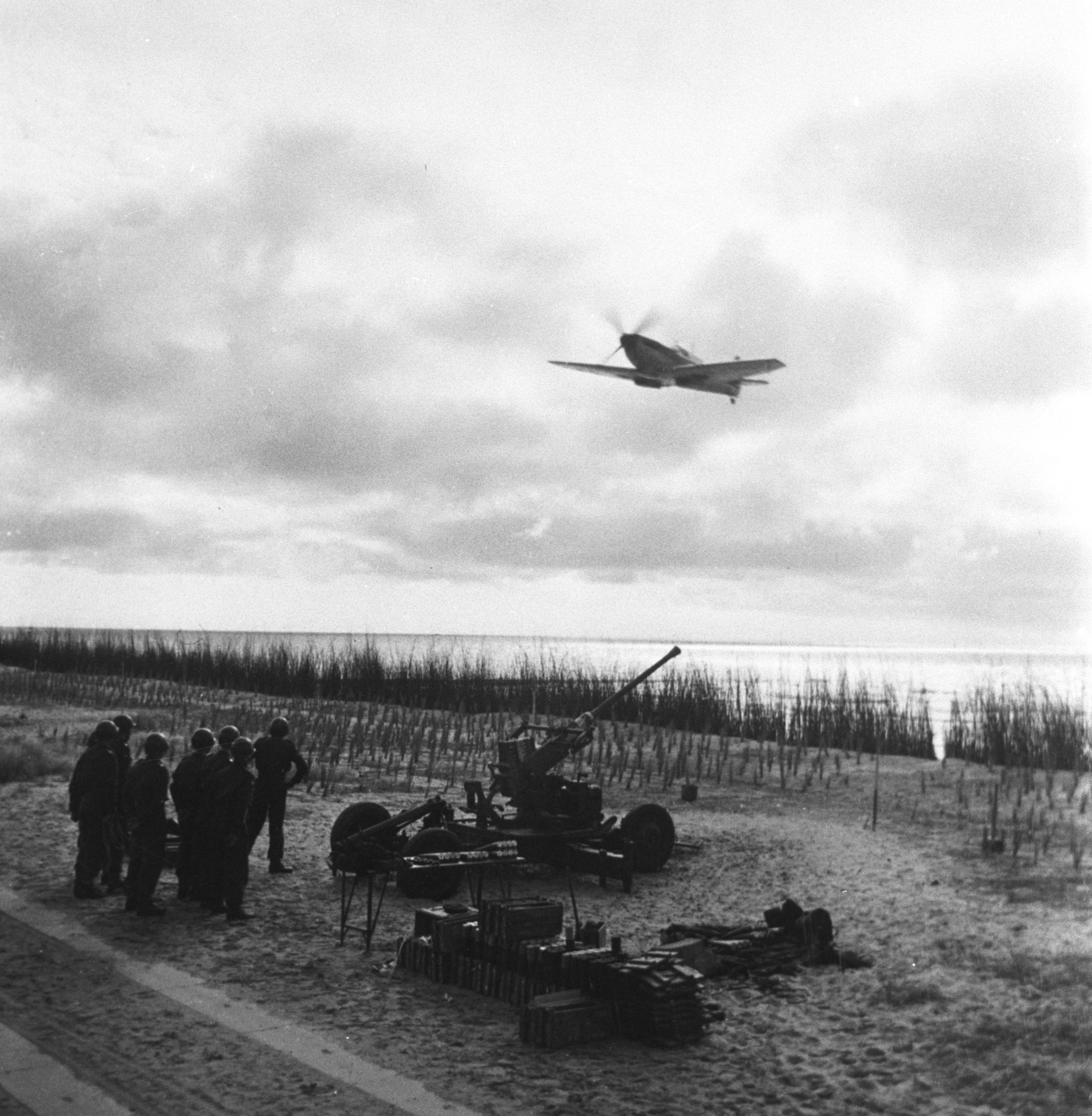 Op het luchtdoelartillerieschietkamp in Den Helder schieten luchtdoelartileristen met een Bofors 40L60-kanon op een door een Spitfire getrokken sleepzak. Foto genomen op het schietterrein 'Grote Keeten', even ten zuiden van 'Het Botgat', datering tussen 1952-1962.